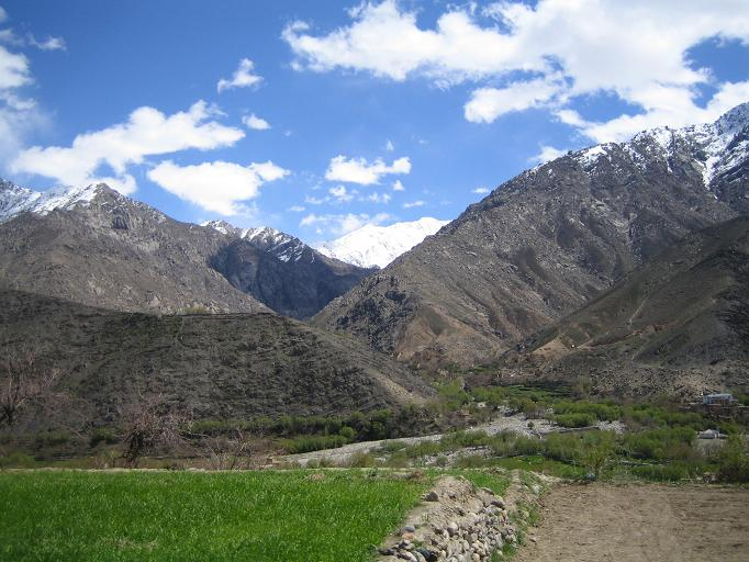 Vallée du Pandjchir - Mai_2006